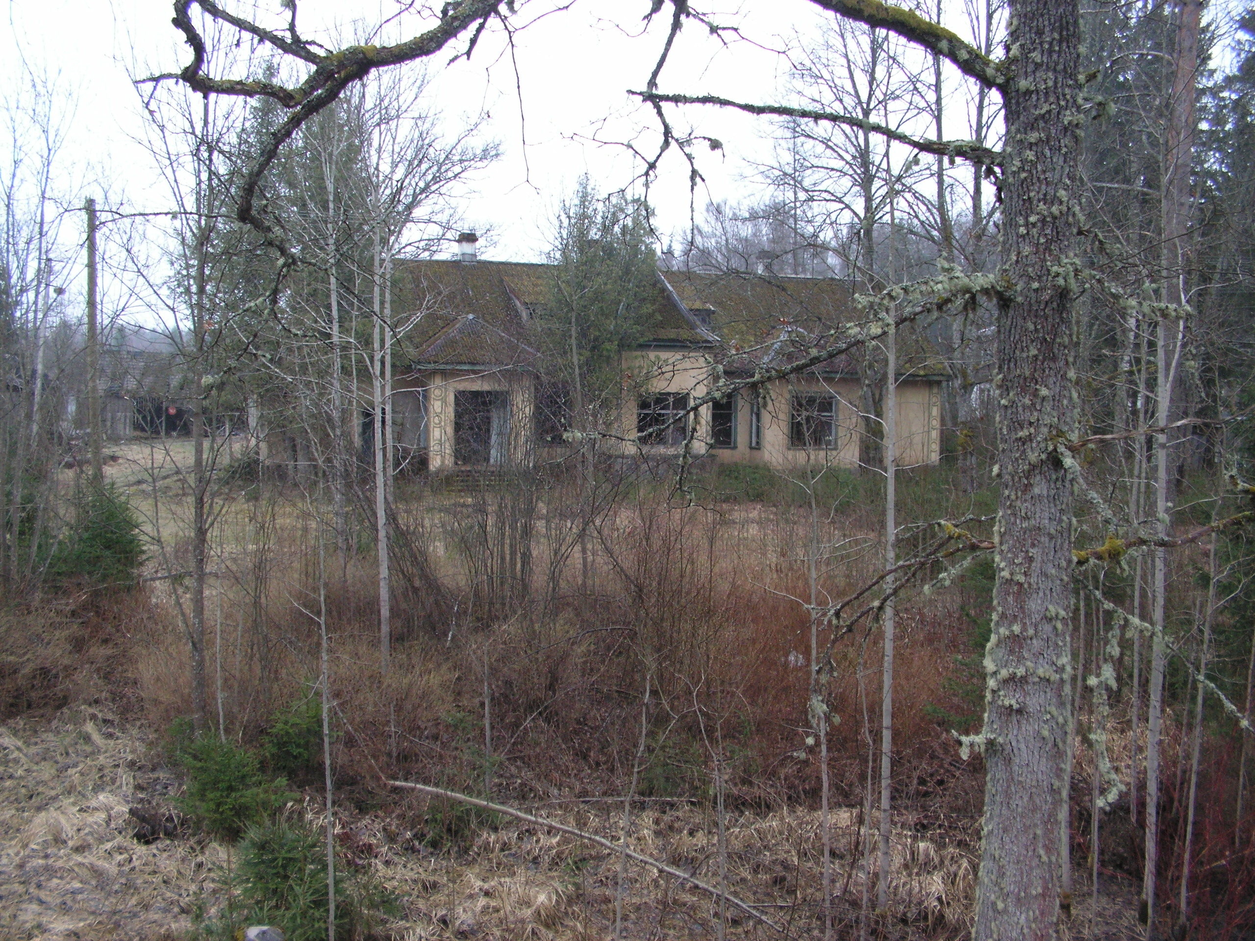 Abja linavabriku direktori elamu